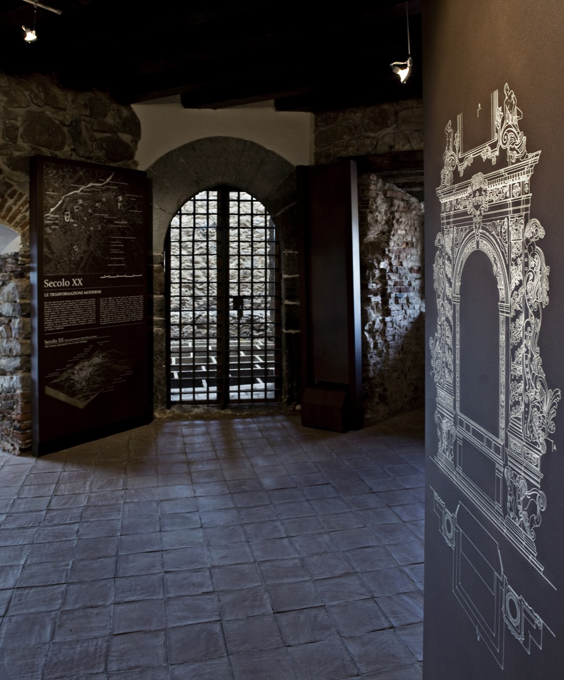 Sezione storico-urbanistica del Museo Civico di Castelbuono